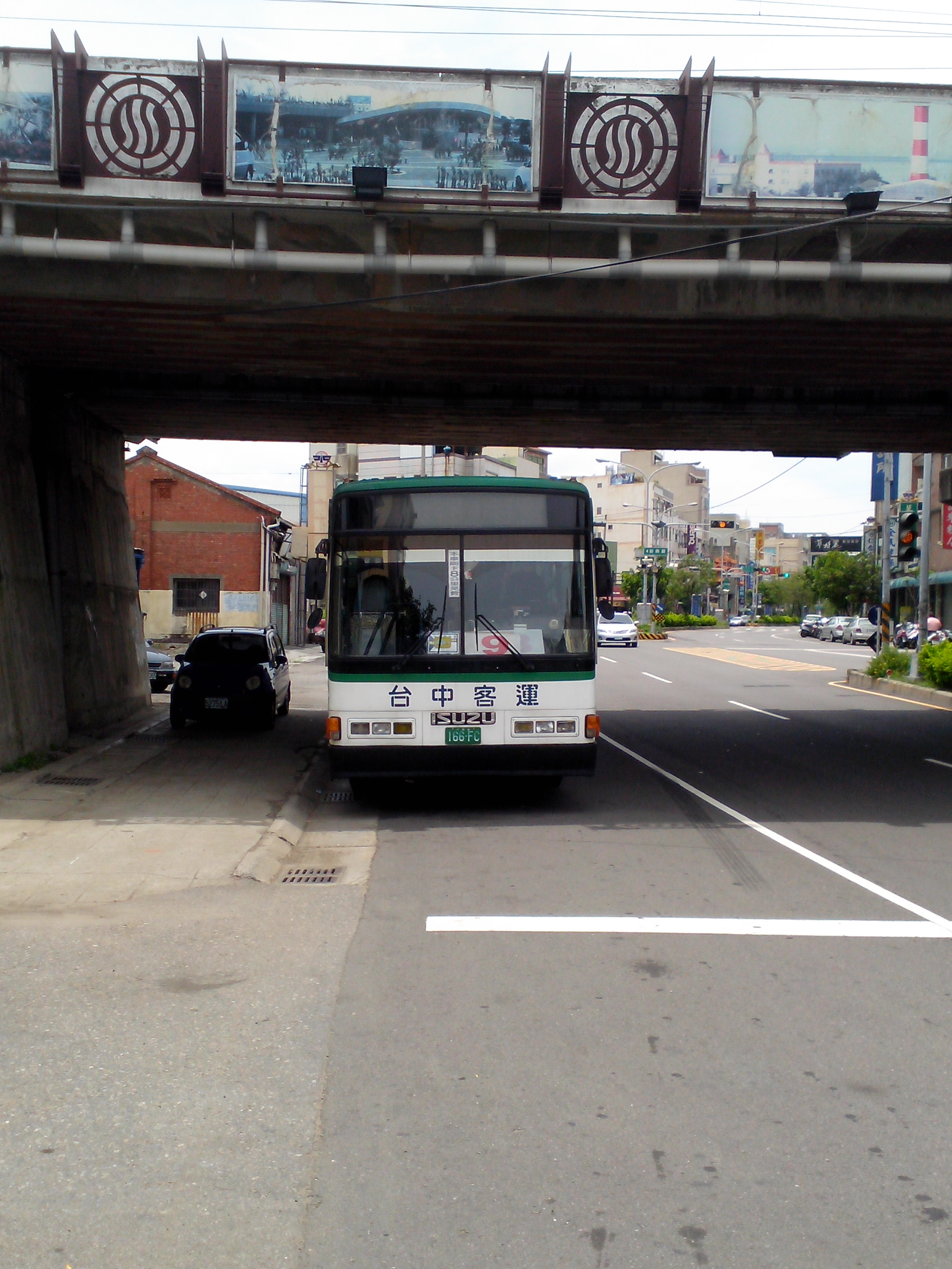 台中客運168-FC 2004 ISUZU LT134P 於台中市公車9路